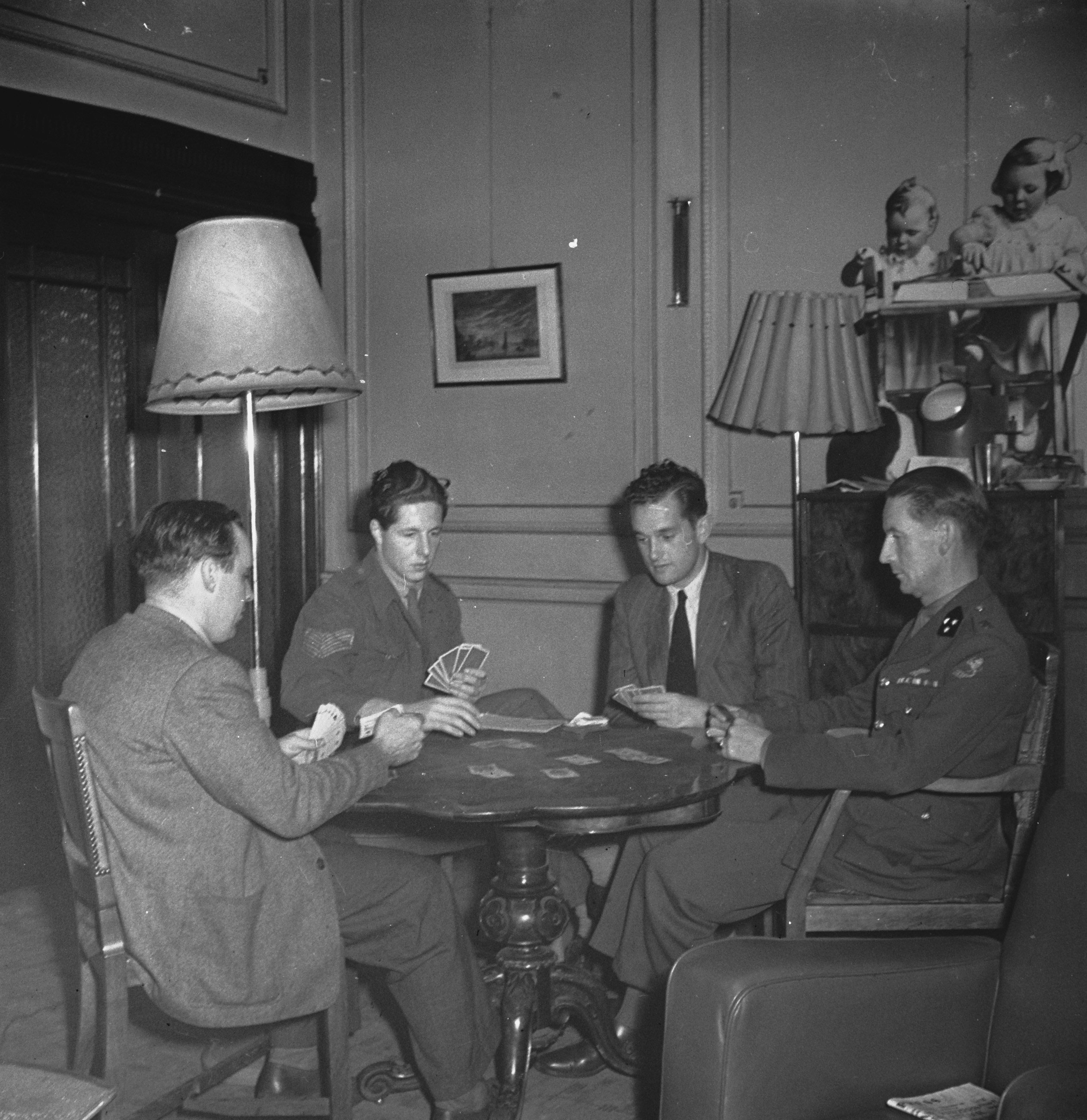 Collectie / Archief : Fotocollectie Anefo Reportage / Serie : HIE [Holland in England] / Anefo Londen serie Beschrijving : Oranjehaven, de Engelandvaarders club in Londen. Kaartspel Datum : 1944 Locatie : Groot-Brittannië, Londen Trefwoorden : clubs, kaartspelen, militairen, recreatie, tweede wereldoorlog Instellingsnaam : Oranjehaven Fotograaf : Onbekend / Publiek Domein, [onbekend] Auteursrechthebbende : Nationaal Archief Materiaalsoort : Negatief (zwart/wit) Nummer archiefinventaris : bekijk toegang 2.24.01.03 Bestanddeelnummer : 935-2582